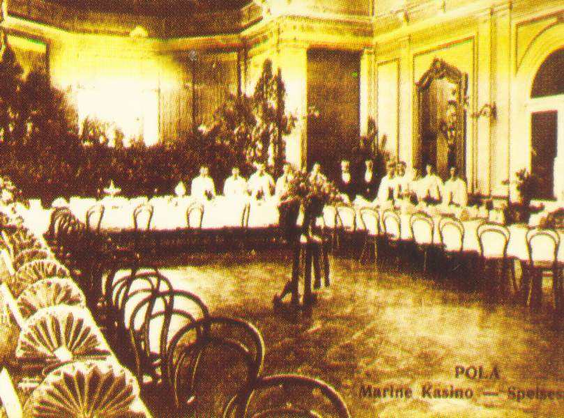 Pula, Marine Kasino, ca. 1901. Old postcard.